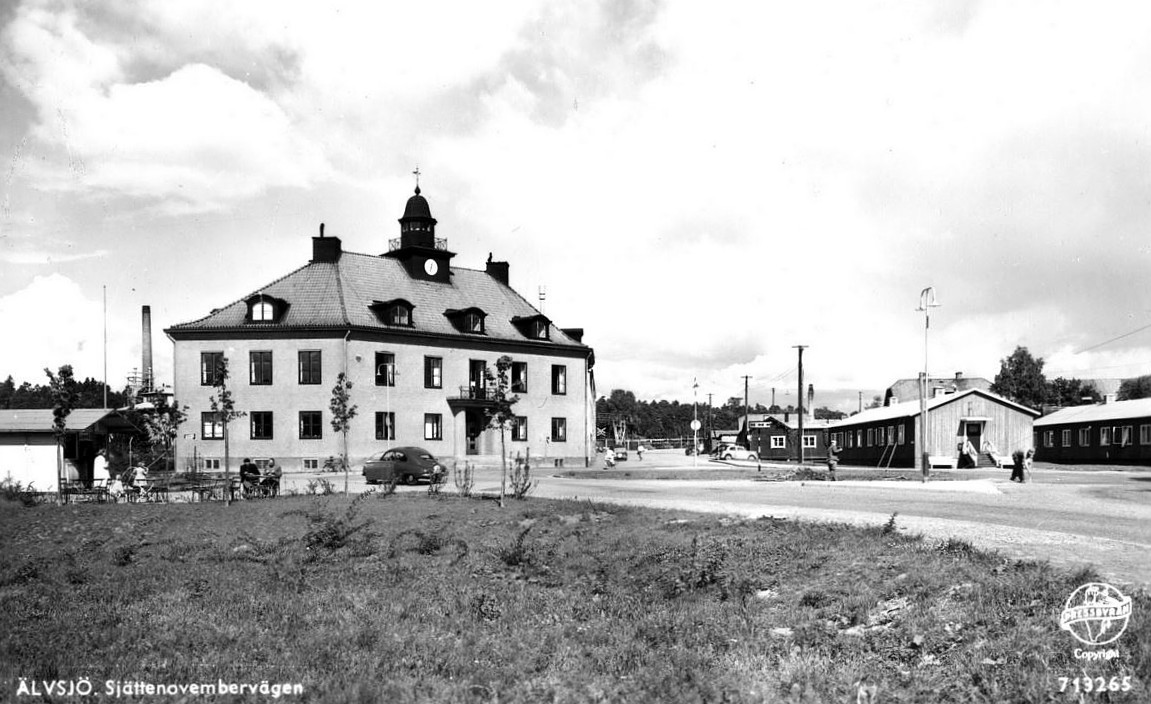 Klockhuset i Solberga. Kontorsbyggnad från 1918 som ursprungligen uppfördes som huvudbyggnad för AB Stockholmstelefons kabelfabrik. Idag ingår byggnaden i en konferensanläggning. Arkitekt Ivar Callmander